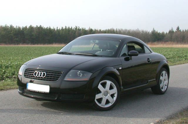 Audi TT Coupé